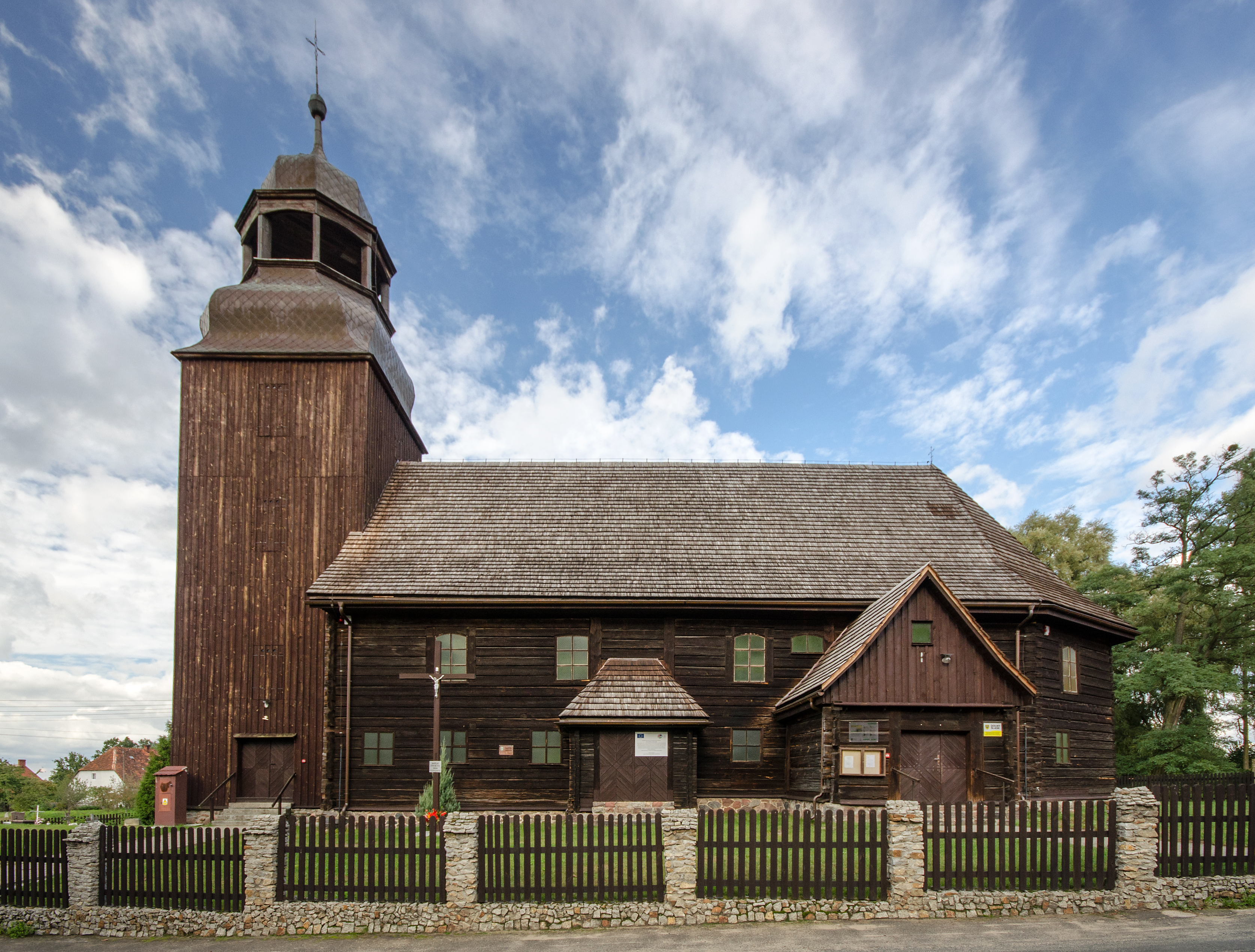 Złotów - dawny kościół ewangelicki, ob. rzymskokatolicki kościół filialny p.w. św. Józefa, XVIII